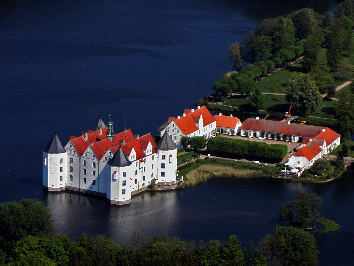 Luftbild vom Kulturdenkmal-Komplex Schloss Glücksburg, das Wasserschloss mit Wirtschaftsgebäuden und Schosspark in der Stadt Glücksburg in Schleswig-Holstein - Foto Wolfgang Pehlemann Steinberg/Ostsee IMG 6753